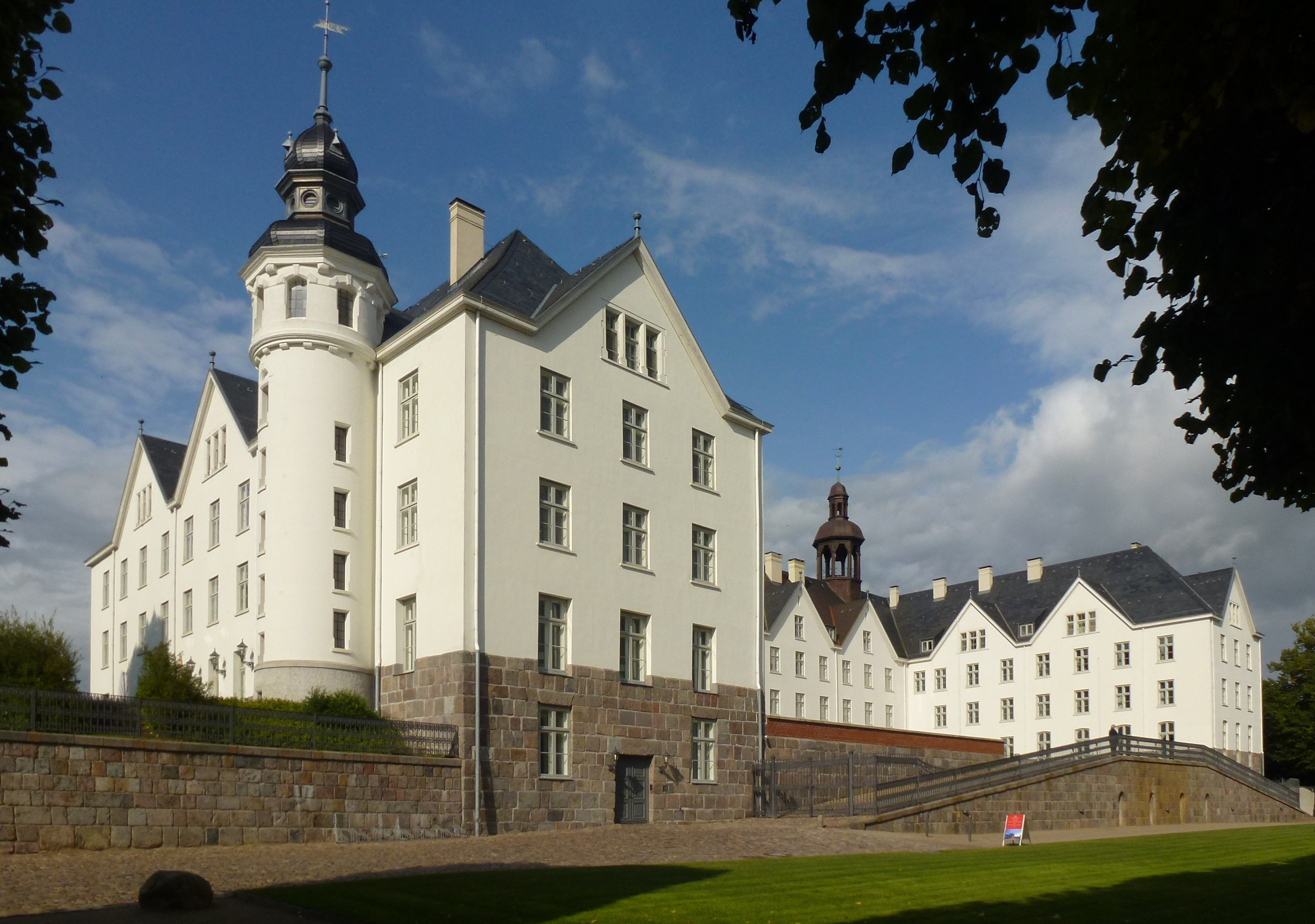 Slott Plön